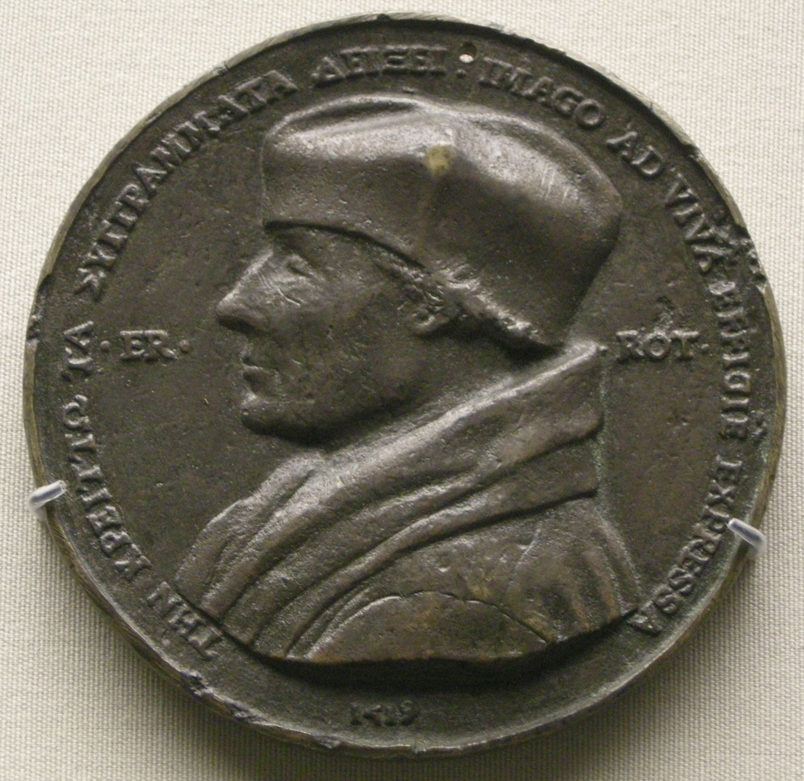 Quentin metsys, medaglia di desiderio erasmo